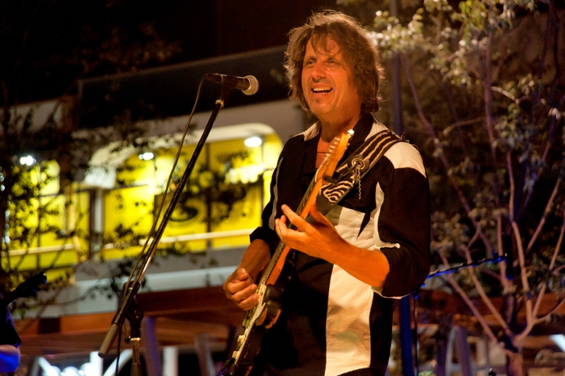 Aerodrom Jurica Pađen